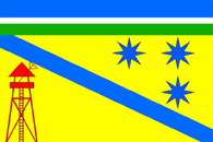 Флаг станицы Чамлыкская Лабинского района Краснодарского края